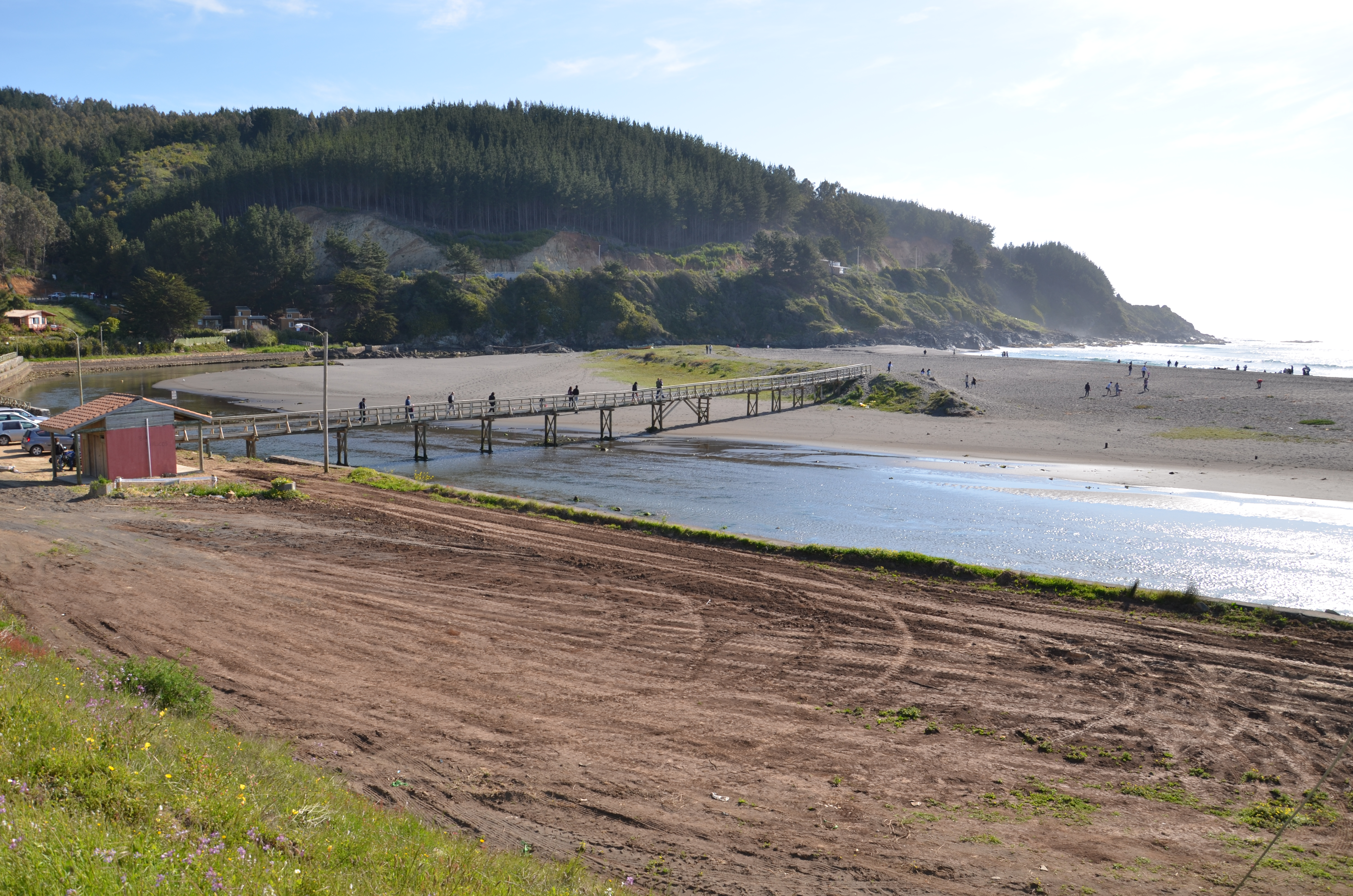 Puente Buchupureo, Cobquecura